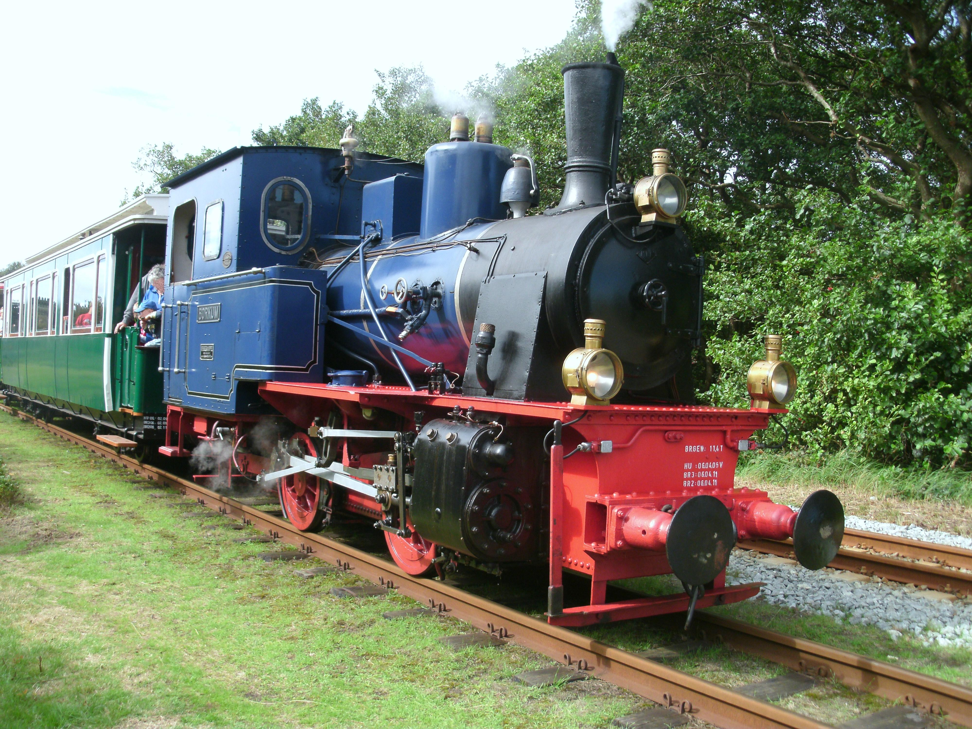 Der Dampfzug (Lok Borkum III) der Borkumer Kleinbahn mit Nostalgiewagen zwischen Jakob-van-Dyken-Weg und Reede bei einem Fotohalt kurz vor dem Deichschart.